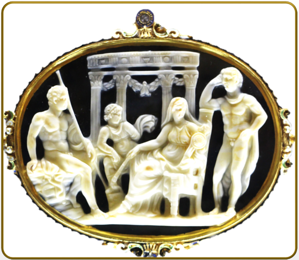 Ulisse e Diomede. Immagine tratta da: 040 arte pseudonatica, ulisse e diomede nell'atto di impadronirsi del palladio, calcedonio, 1500-50 ca..JPG